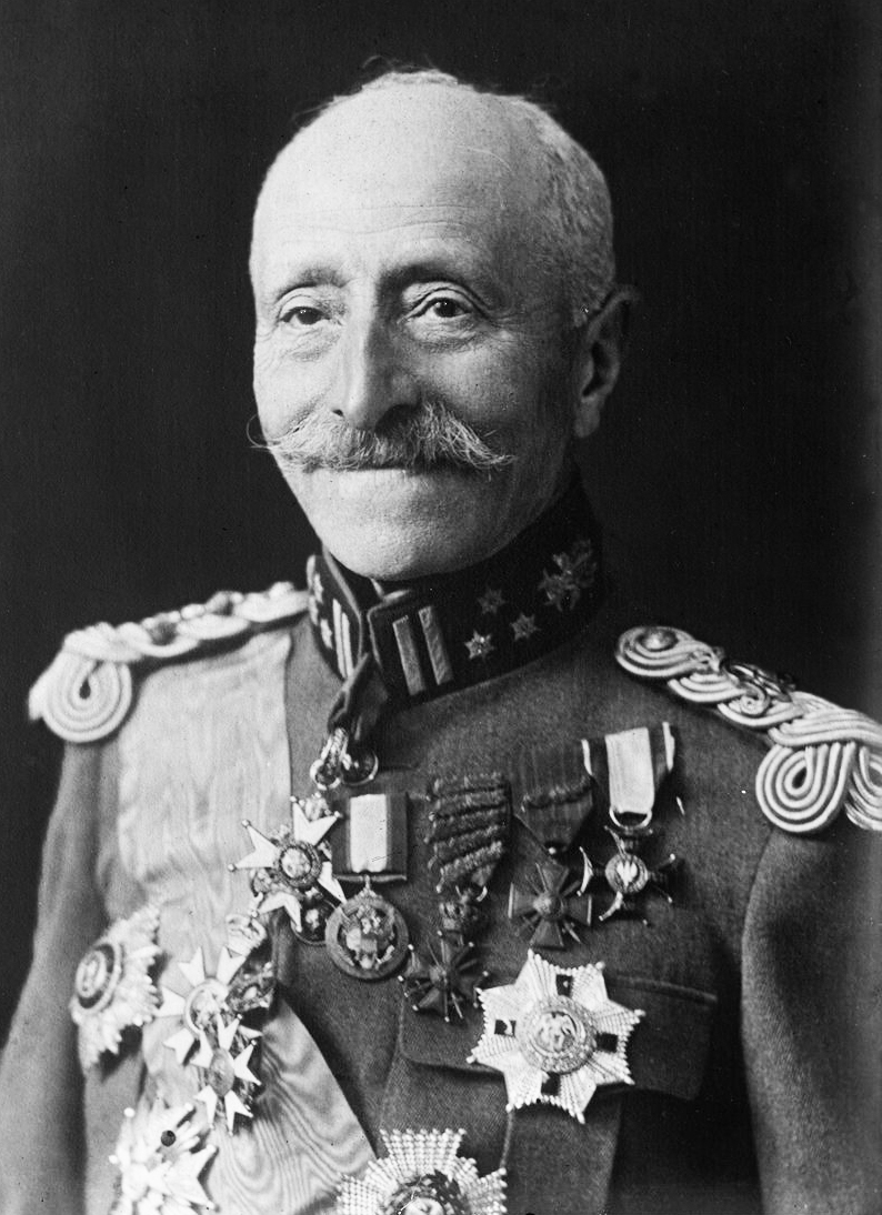 Général Louis Bernheim (1861-1931)